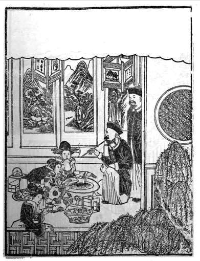 長崎の唐館に出向いた丸山遊女